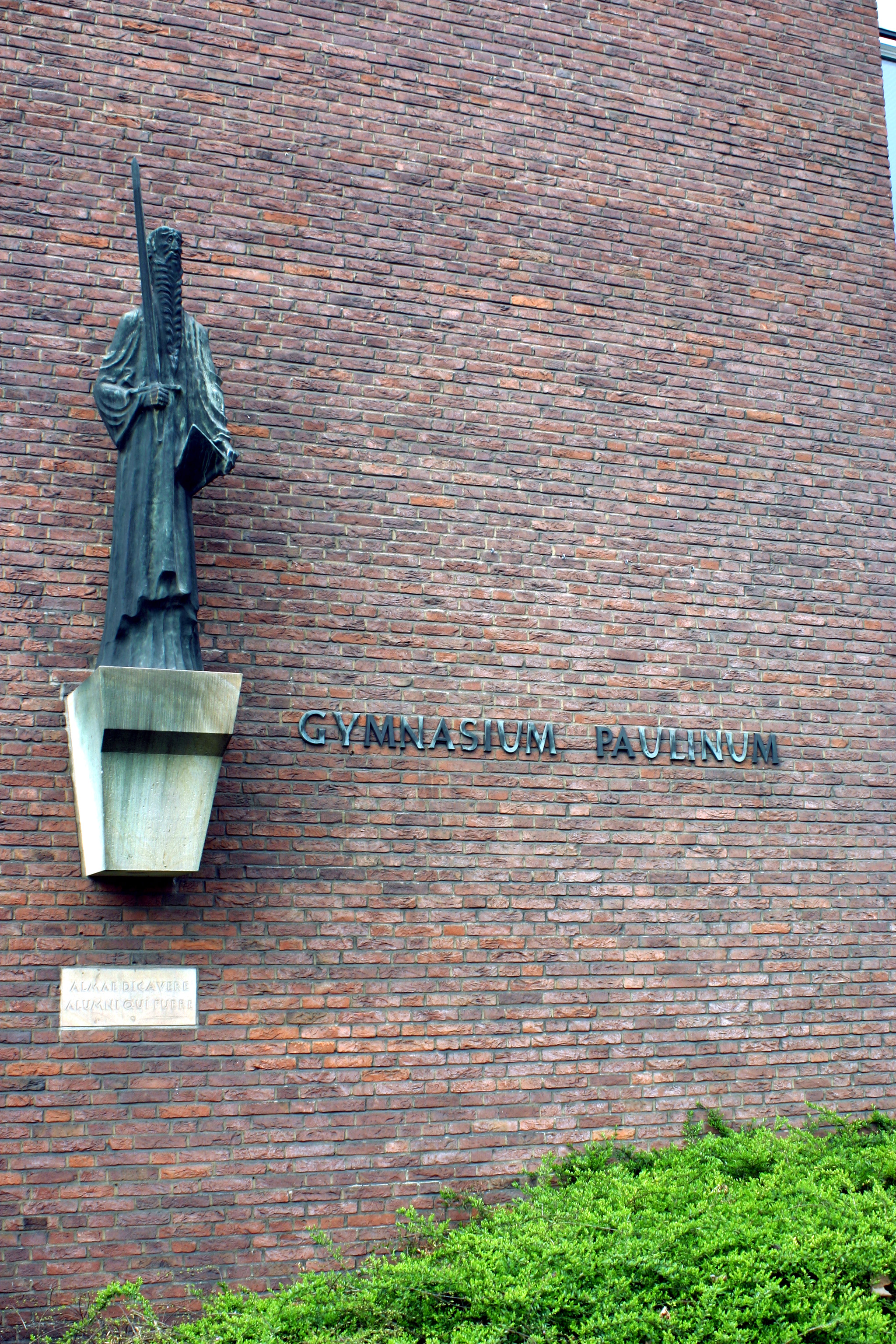 Das Gymnasium Paulinum im westfälischen Münster